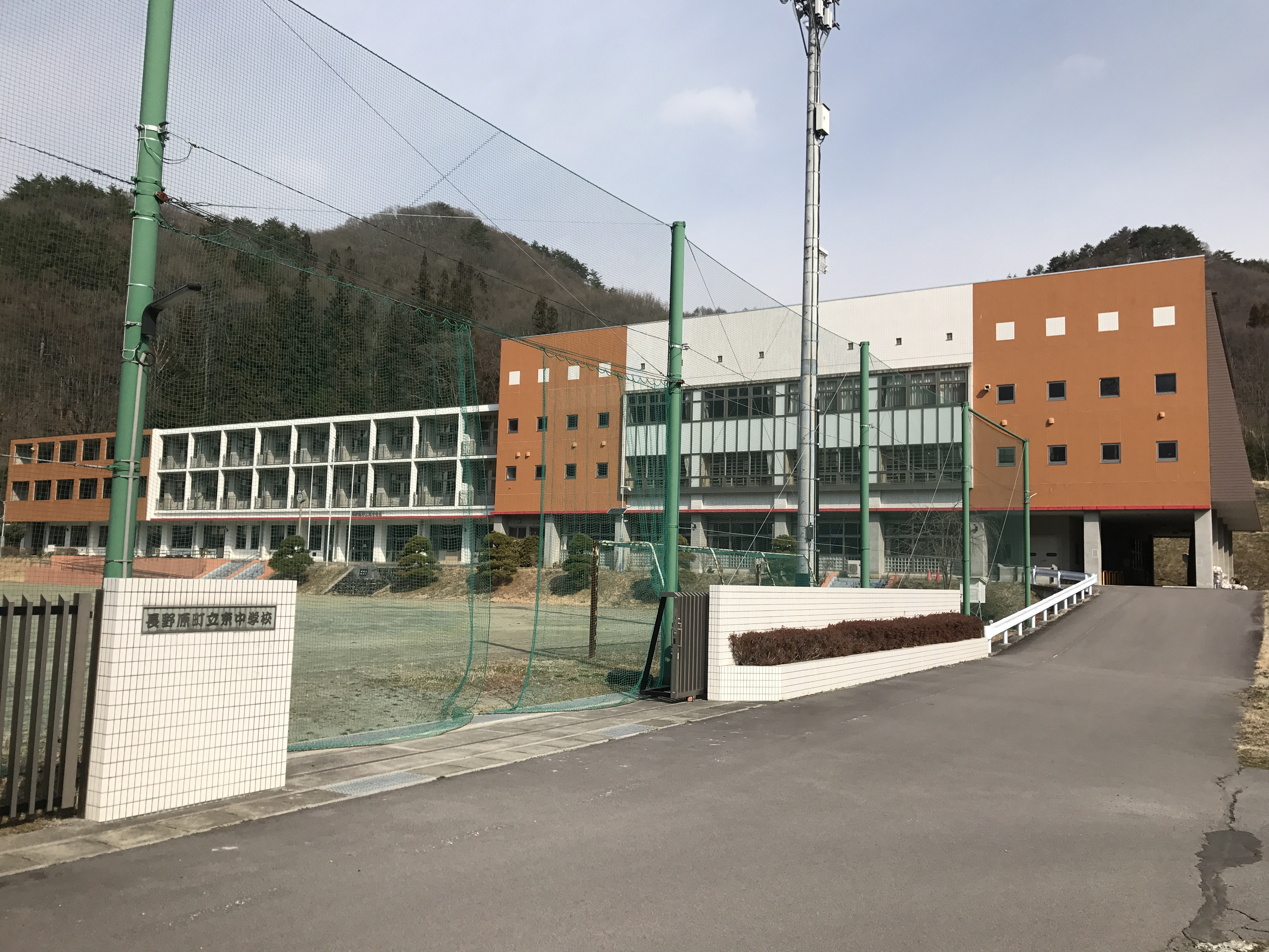 長野原町立東中学校の校門と校舎